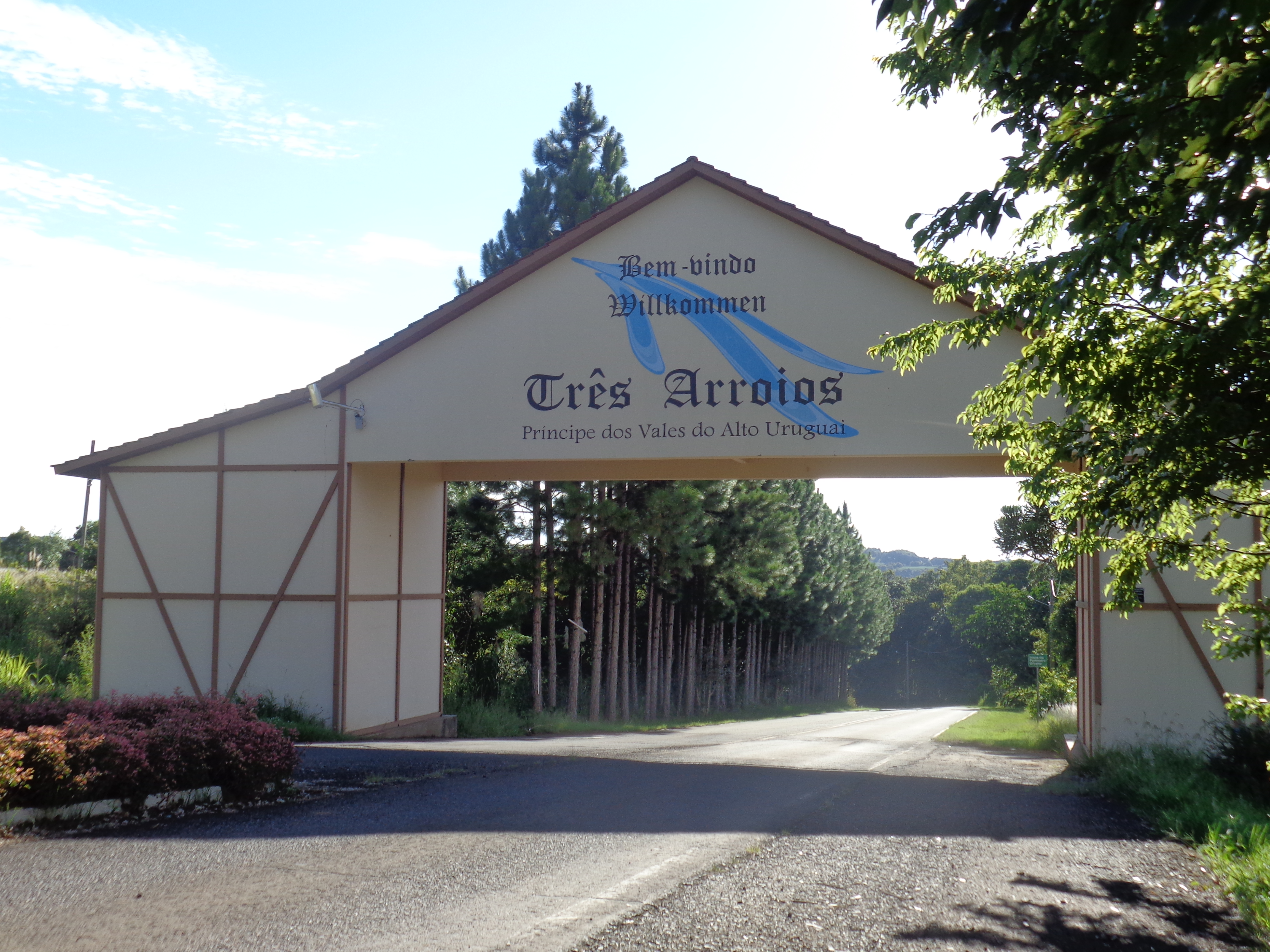 Pórtico de entrada deTrês Arroios